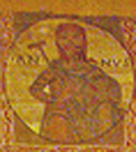 Detall Tapís de la creació. Annus. Segle XI-XII